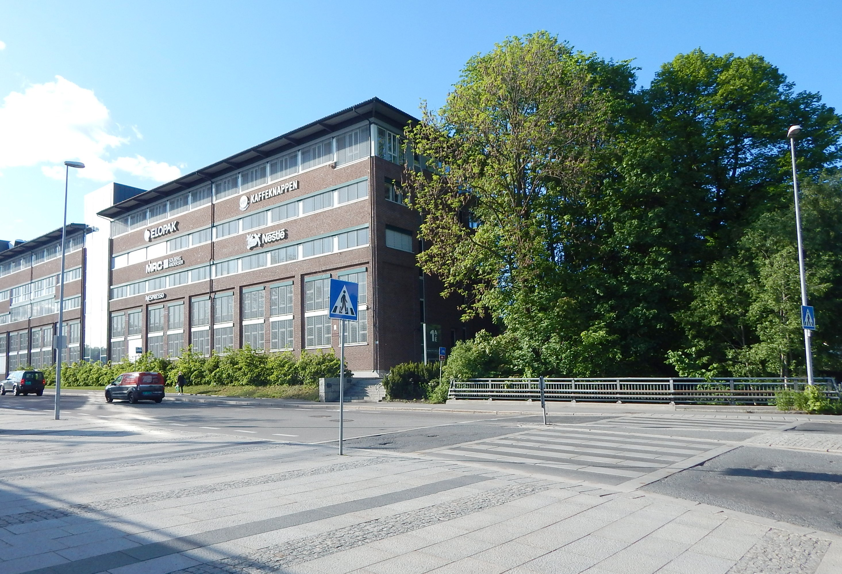 Hoffsveien på Skøyen